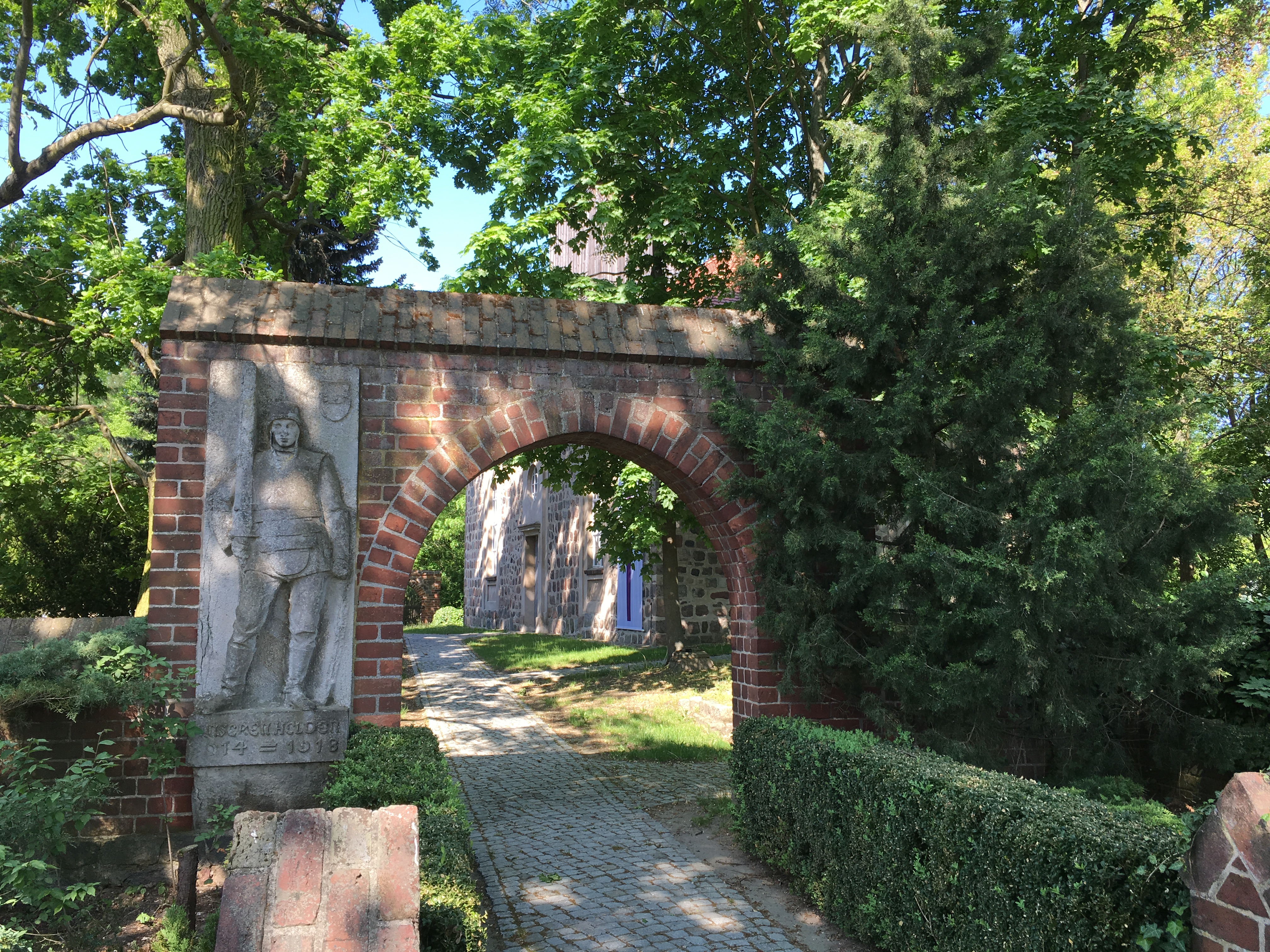 Die Dorfkirche in Mahlow ist eine Saalkirche aus der zweiten Hälfte des 13. Jahrhunderts. Sie wurde in den Jahre 1755 und 1758 erheblich umgestaltet. Im Innern stehen unter anderem ein Kanzelaltar mit dem Monogramm FR von Friedrich II..